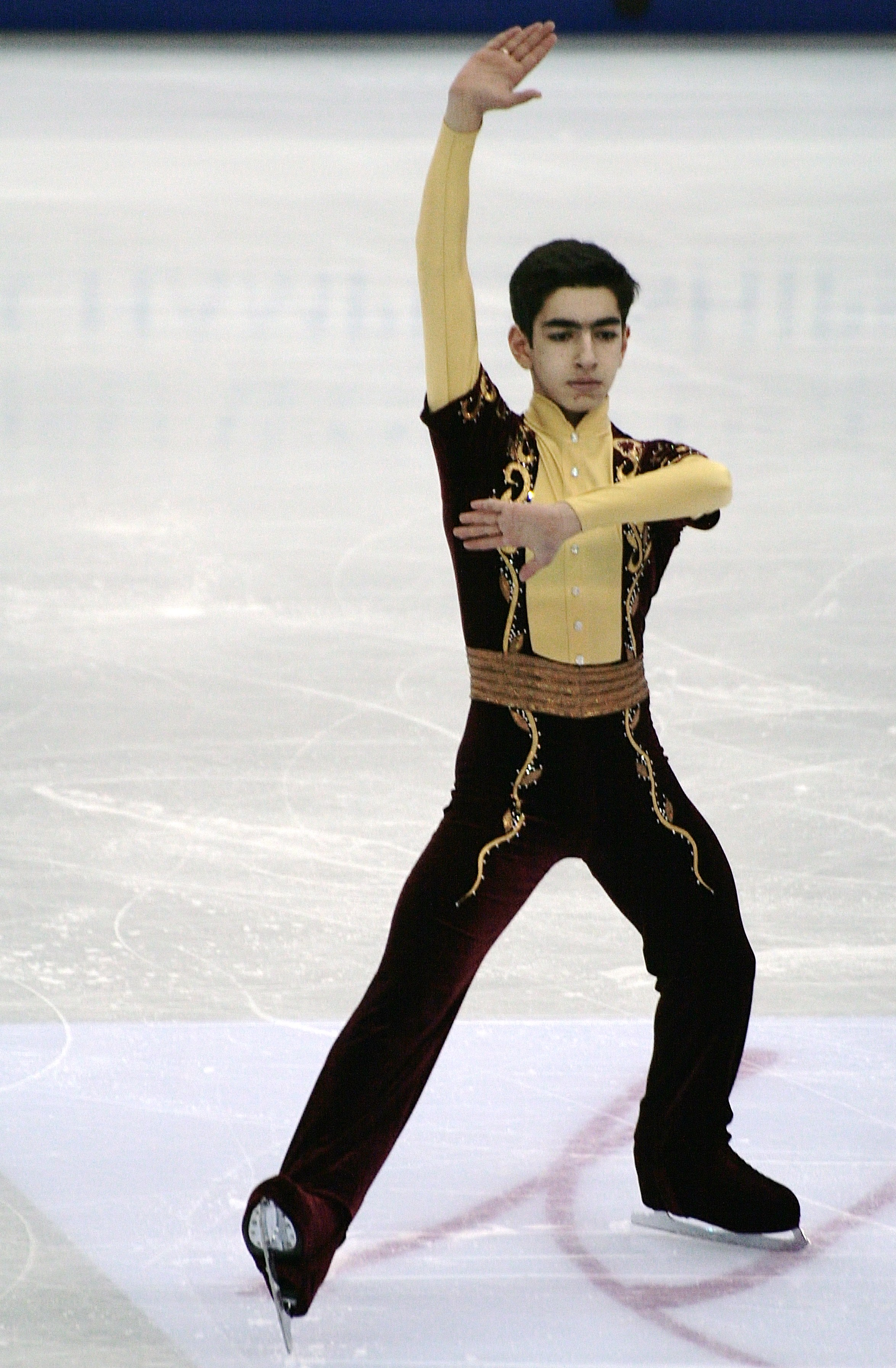 Славик Айрапетян (Армения) на чемпионате мира по фигурному катанию 2012